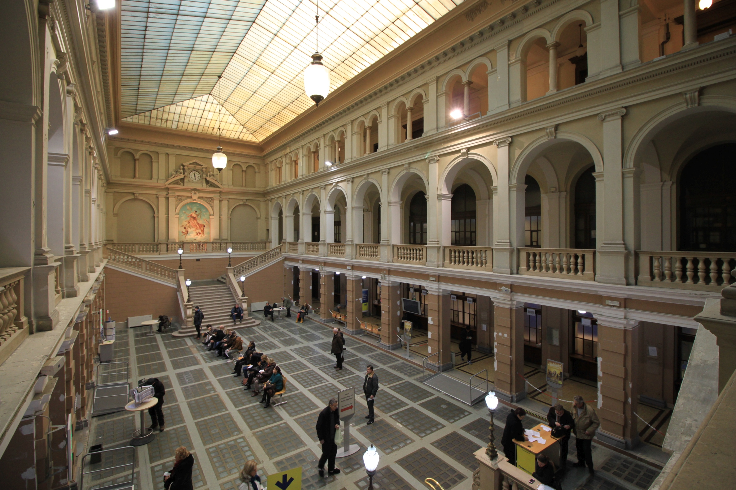 Palazzo delle Poste, Piazza Vittorio Veneto, Trieste; Interiore